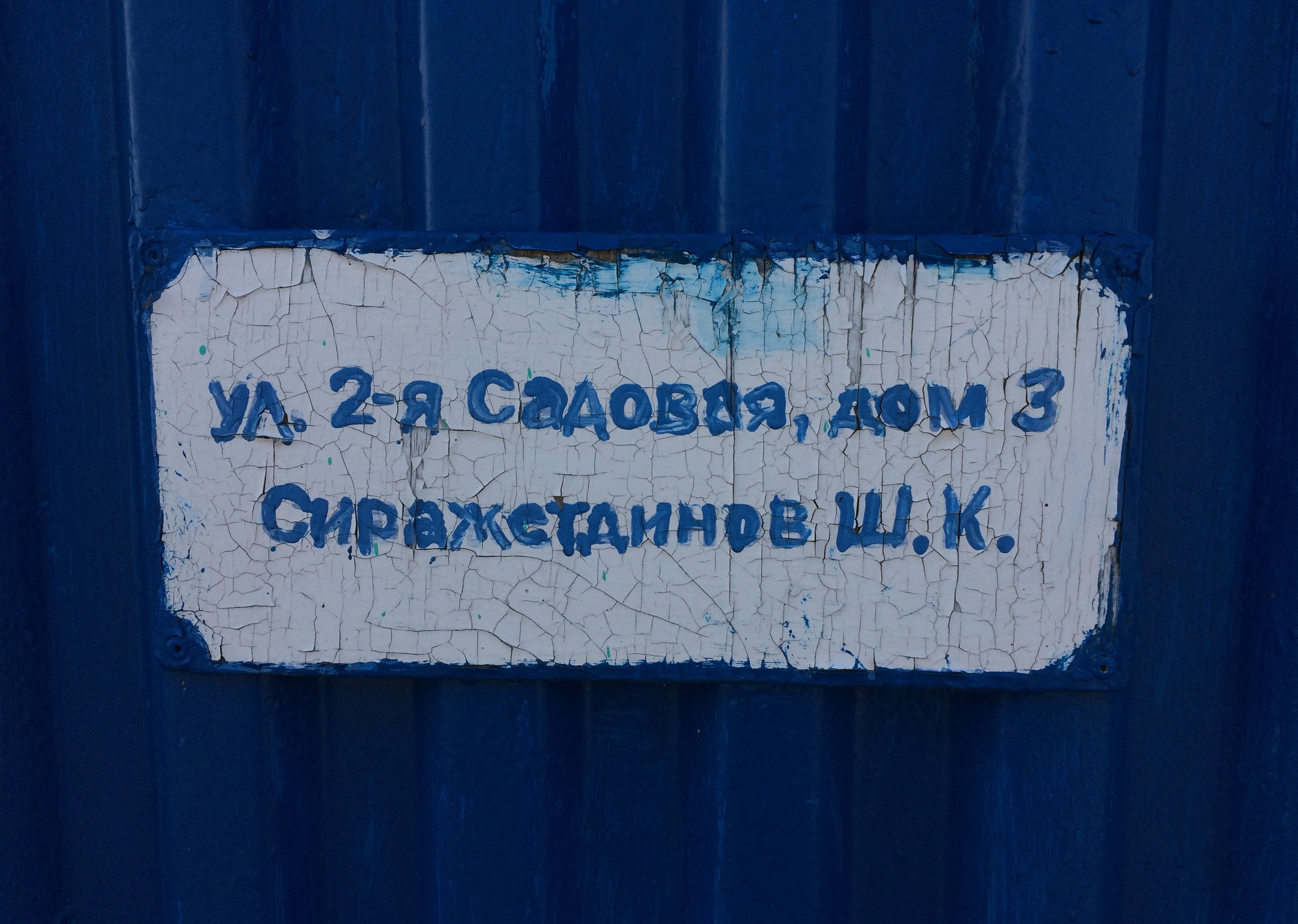 Адресная табличка в селе Ново-Булгары.